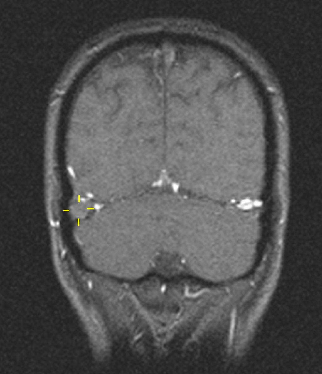 Sinusvenenthrombose in der Kernspintomografie.